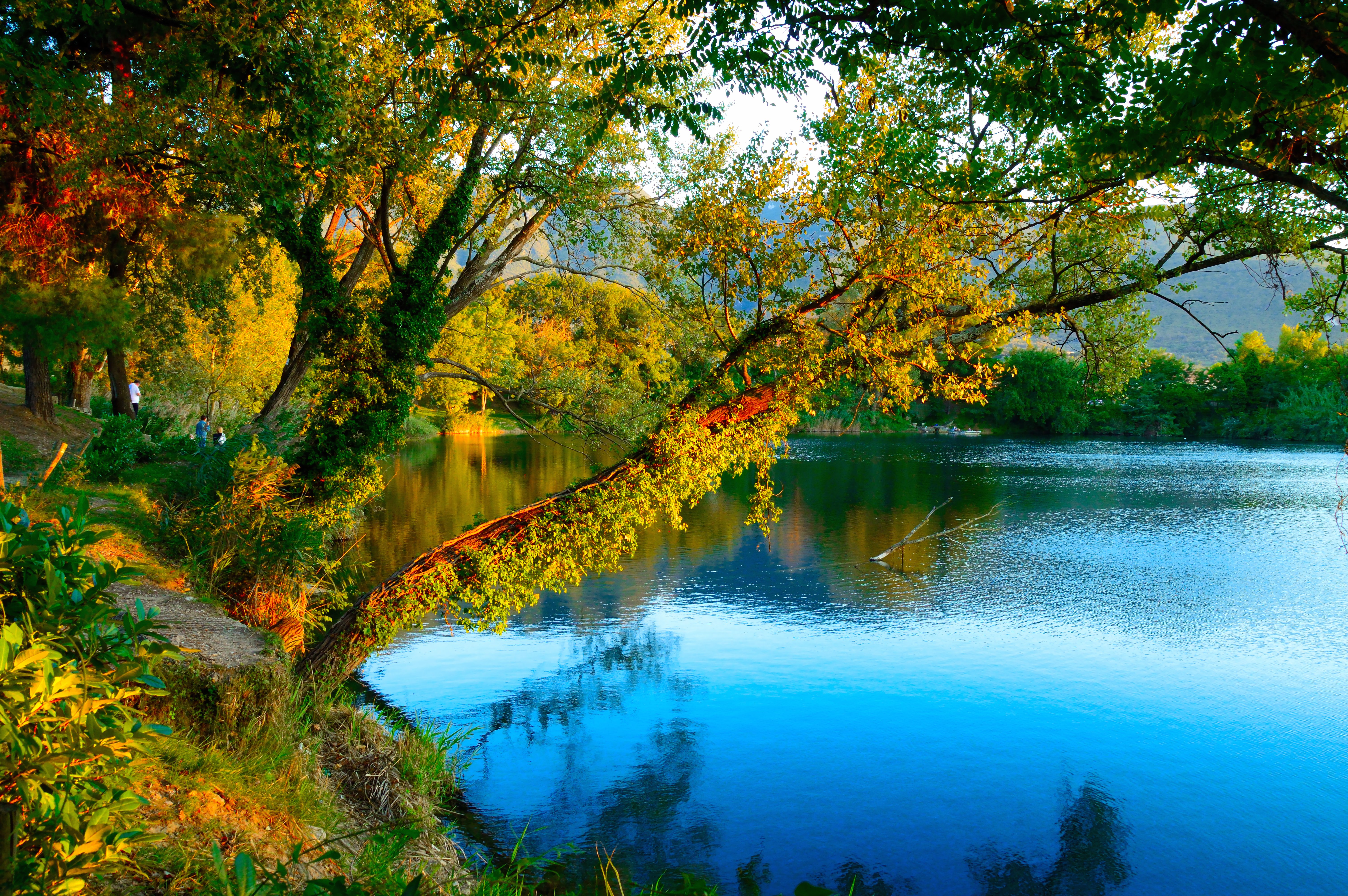 Il lago di Telese Terme (BN)